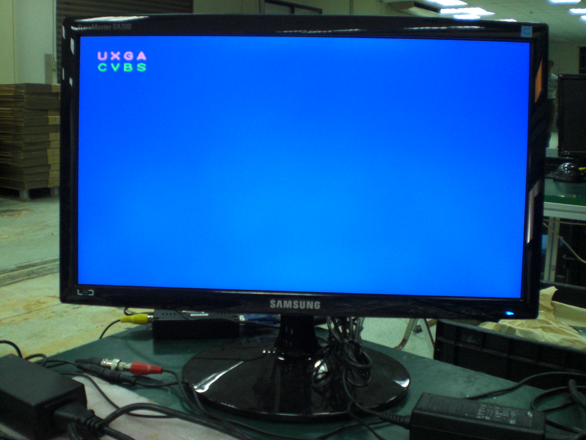 中文（台灣）: 三星電子於2011年5月製造的19吋LED背光高對比節能液晶顯示器LS19A300BS/ZW